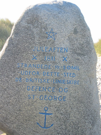 Gedenkstein an Untergang der St. George und der Defence vor Thorsminde.